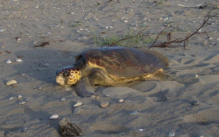 Anamur Caretta caretta